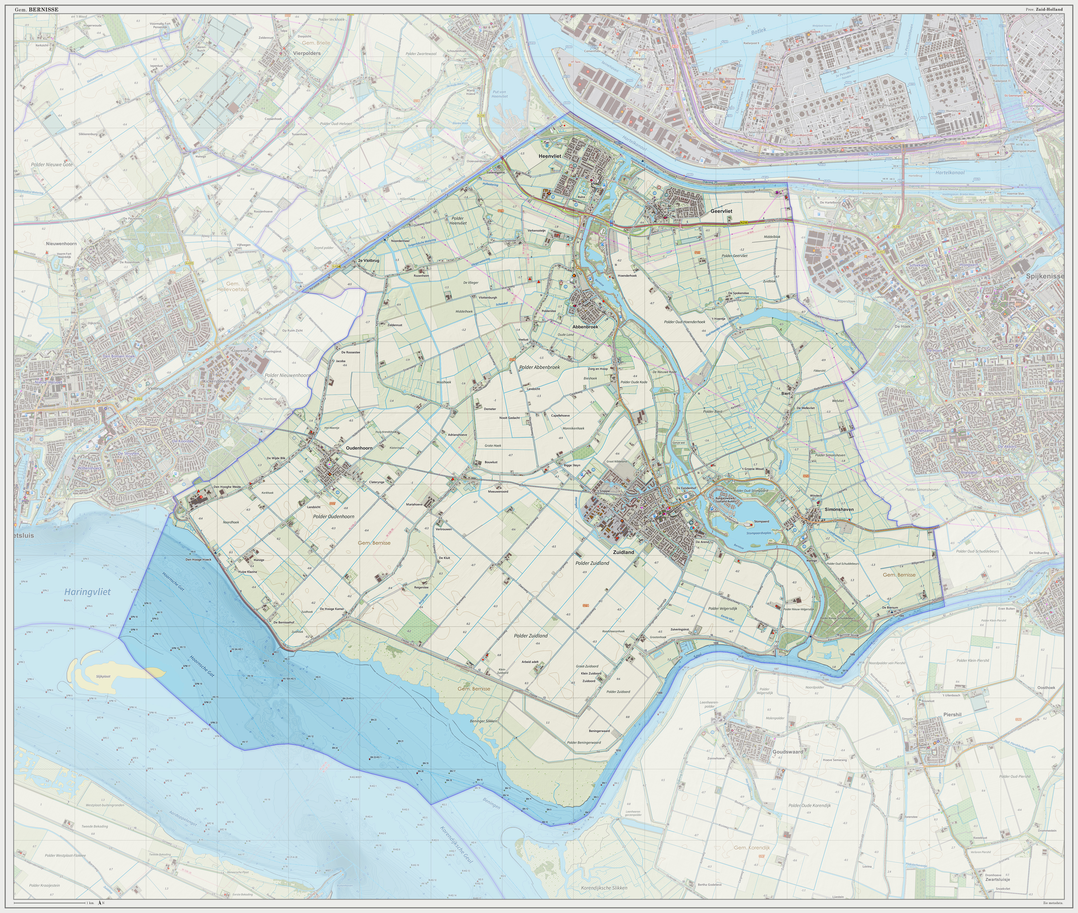 Topografische gemeentekaart per september 2014. Resolutie: 300 pixels/km. Kaartbeeld samengesteld uit de open geodata van de Top10NL en Top25namen (Kadaster, 30-sep-2014), Creative Commons-BY licentie. Gebouwvlakken uit open geodata BAG extract (8-sep-2014). Wegen uit de OpenStreetMap (15-sep-2014), OpenStreetMap community. Reliëfschaduw uit de Actuele Hoogtekaart AHN2 (8-mrt-2014). Samenstelling en kleurenschema: Jan-Willem van Aalst, met QGIS. Zie ook de Legenda.